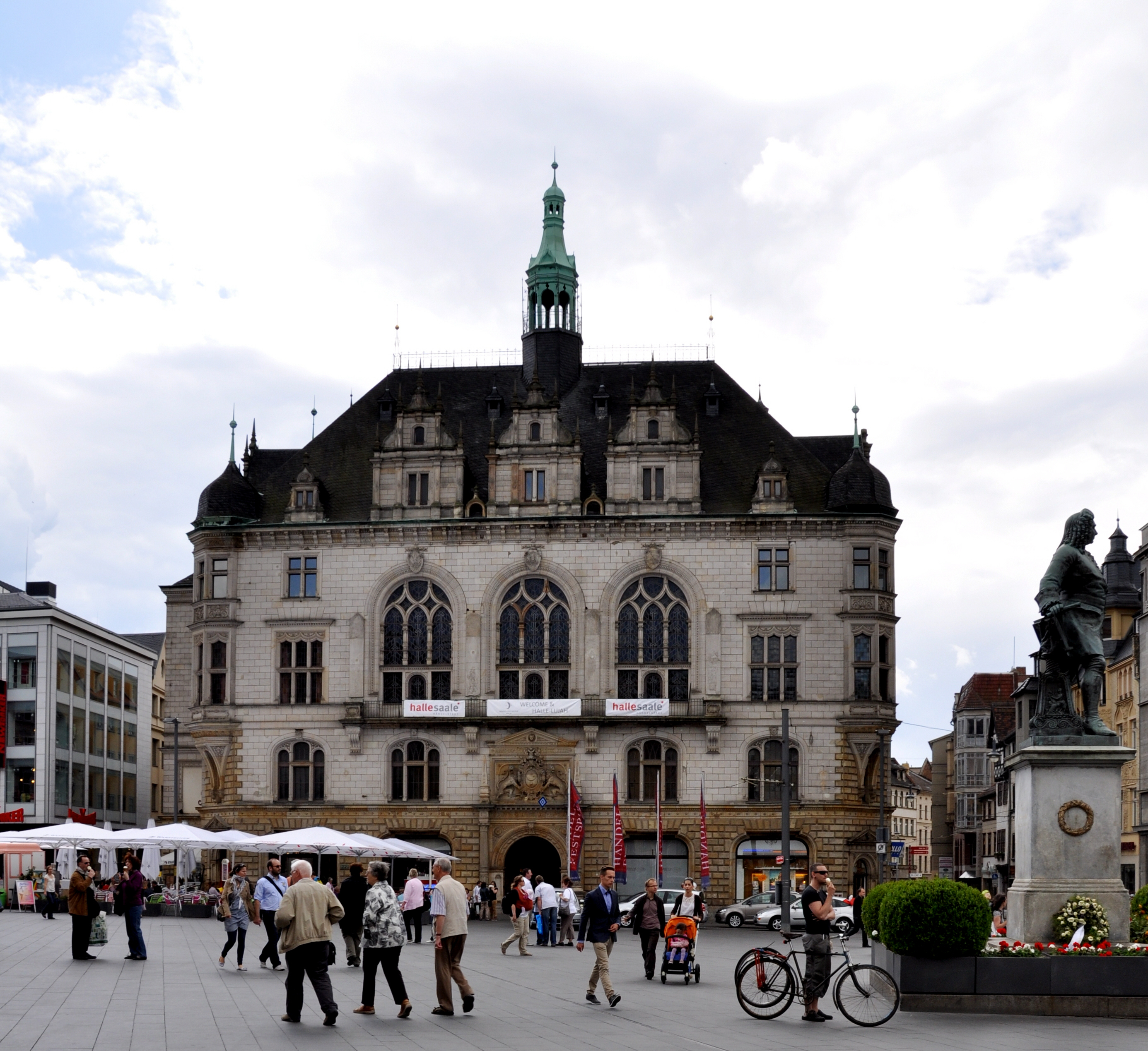 Halle (Saale), Stadthaus am Markt, rechts das Händel-Denkmal